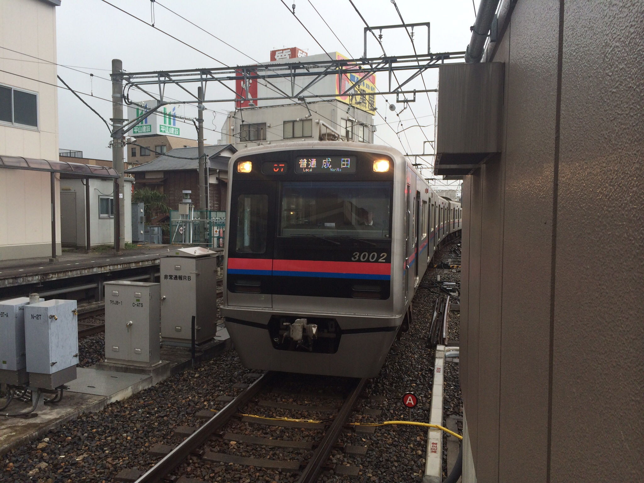 京成東成田線の京成3000形電車